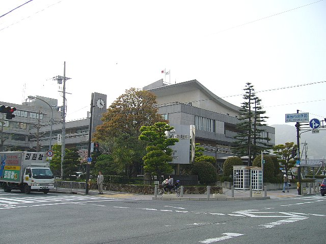 箕面市役所 2006年4月 Bakkai撮影